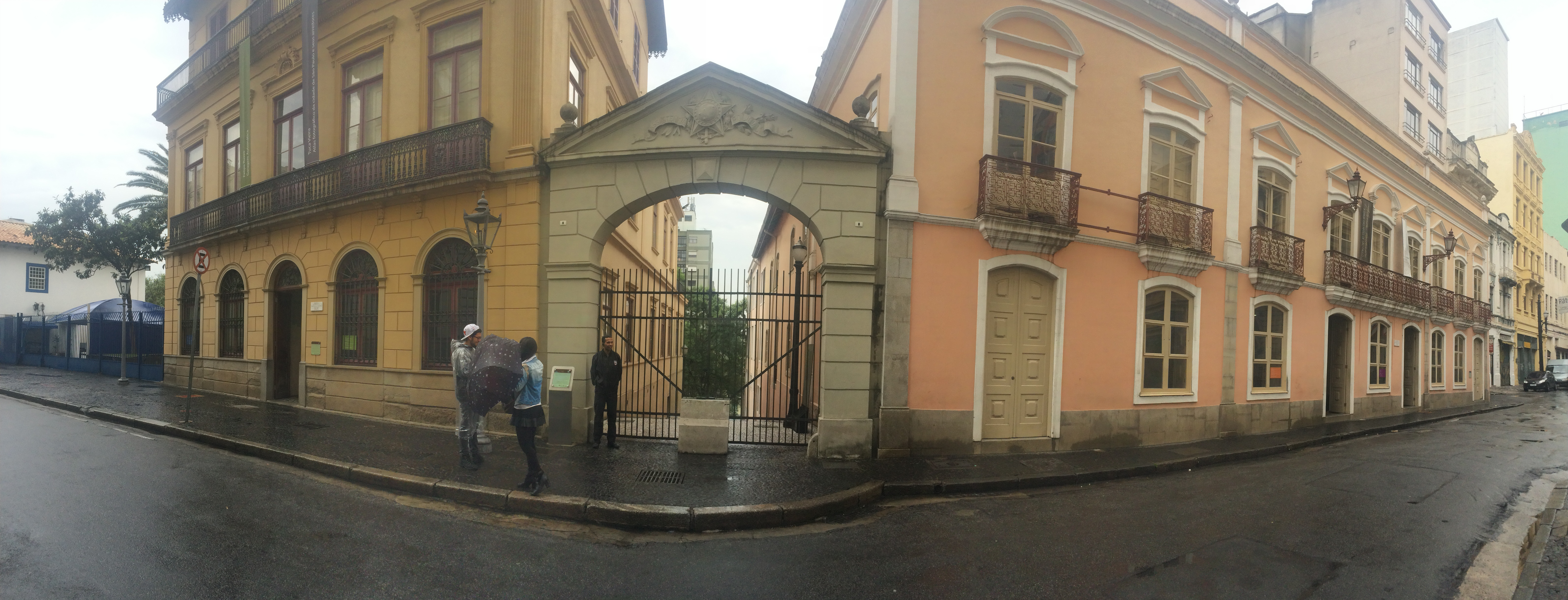 Portão de entrada do Beco do Pinto, localizado no Largo Páteo do Colégio, no centro de São Paulo, entre a Casa nº1 e o Solar da Marquesa de Santos